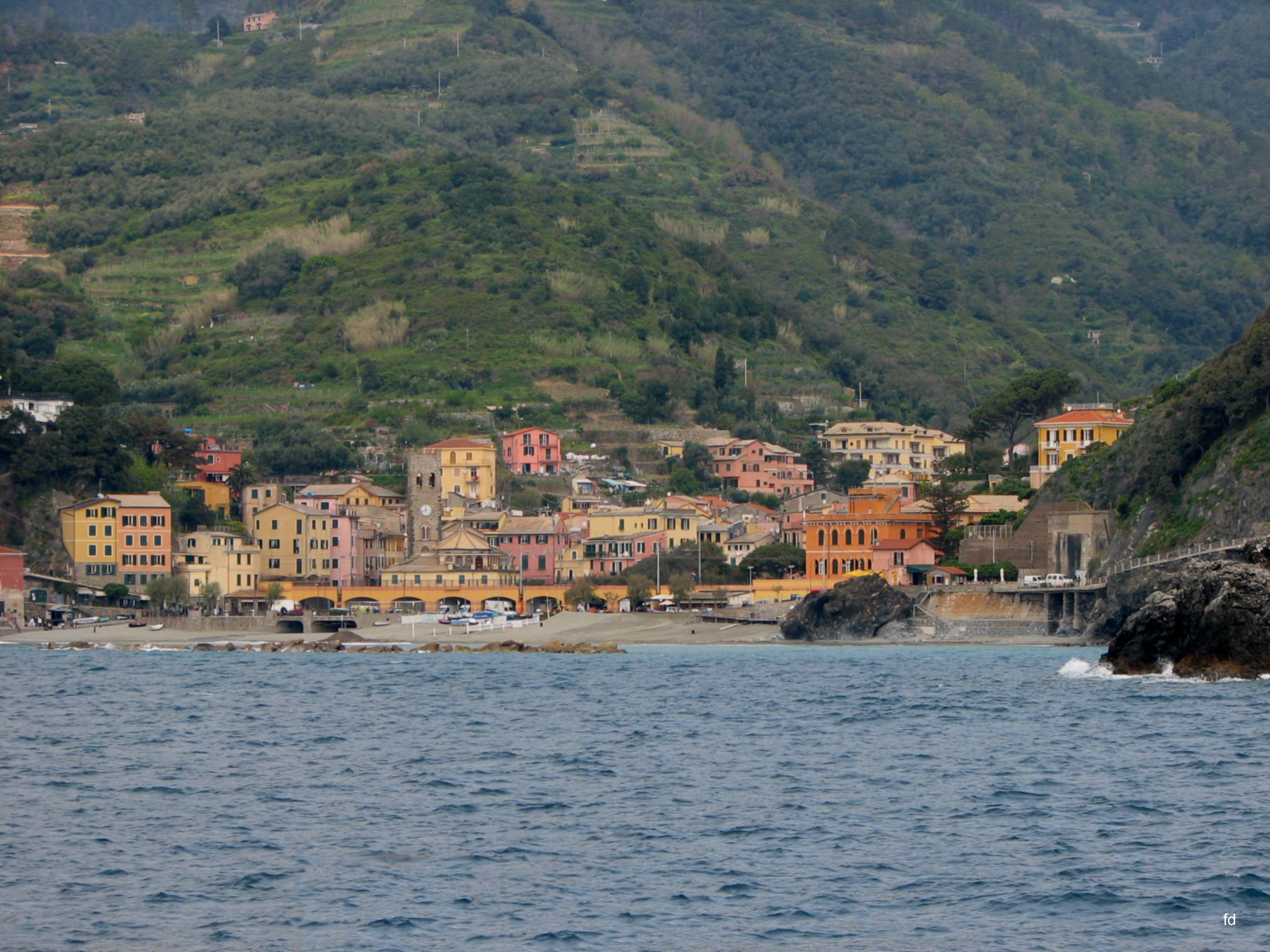 Monterosso Ansicht vom Schiff